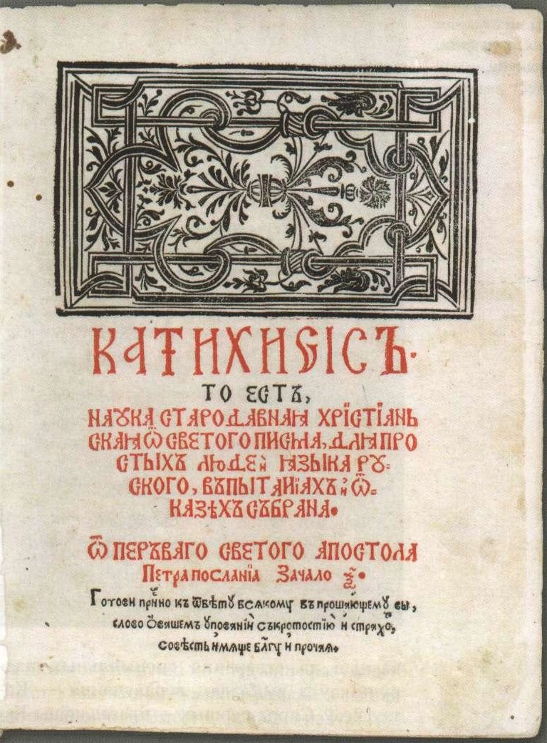 Беларуская (тарашкевіца): Сымон Будны - Катэхізіс, тытульная старонка